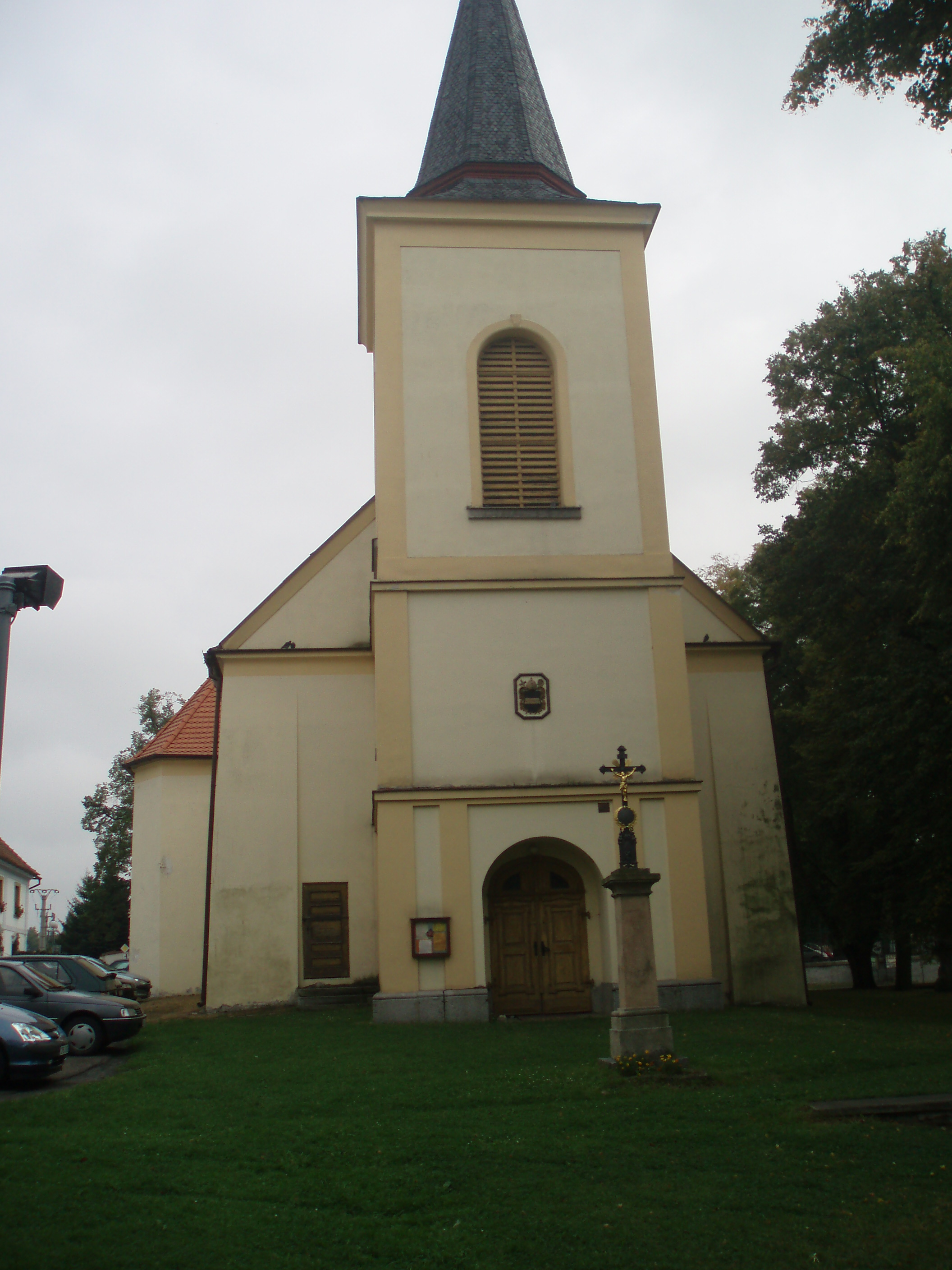 Kostel sv. Mikuláše ve Spáleném Poříčí, okres Plzeň-jih